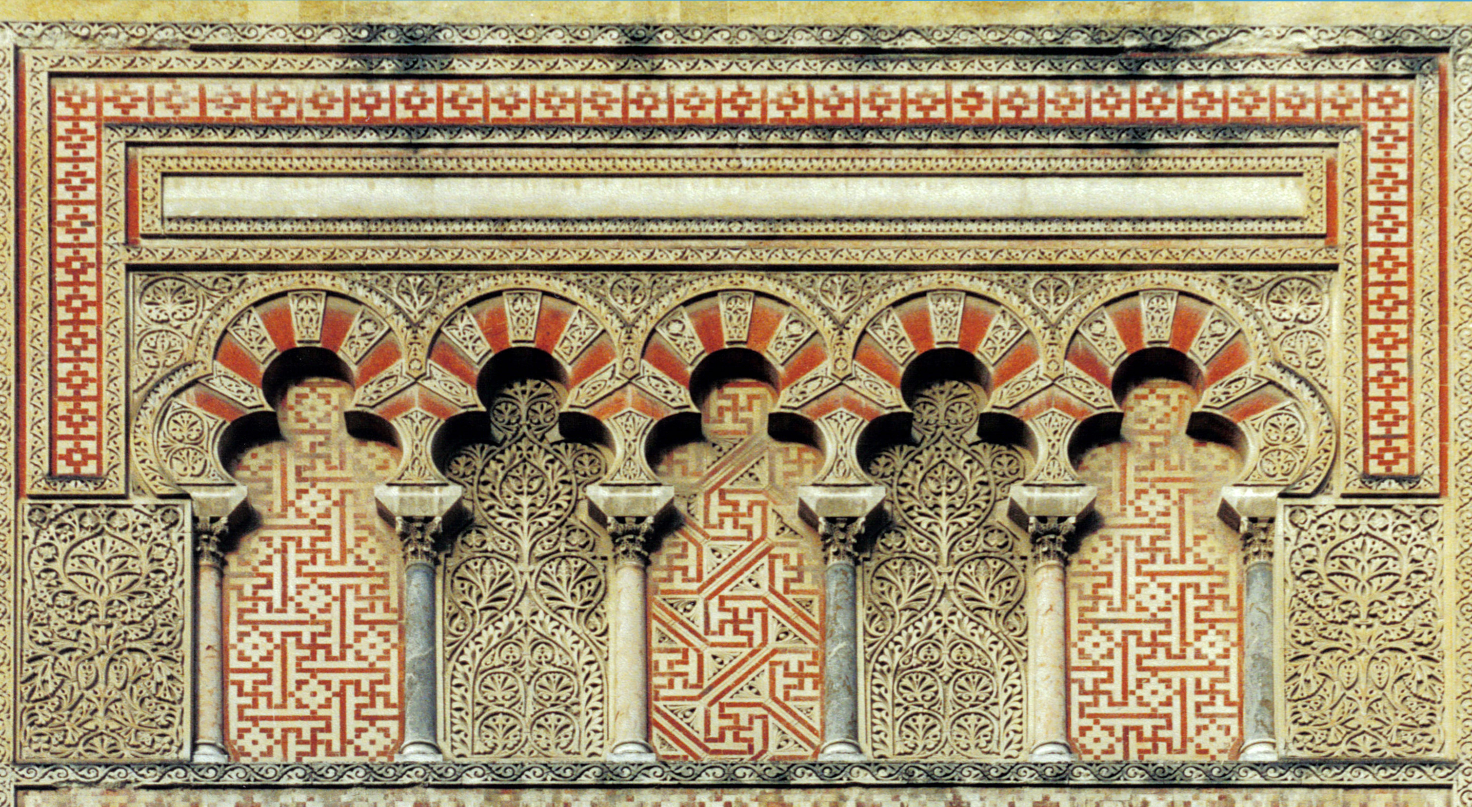 Cordoue - Mosquée - arcature d'arcs polylobés